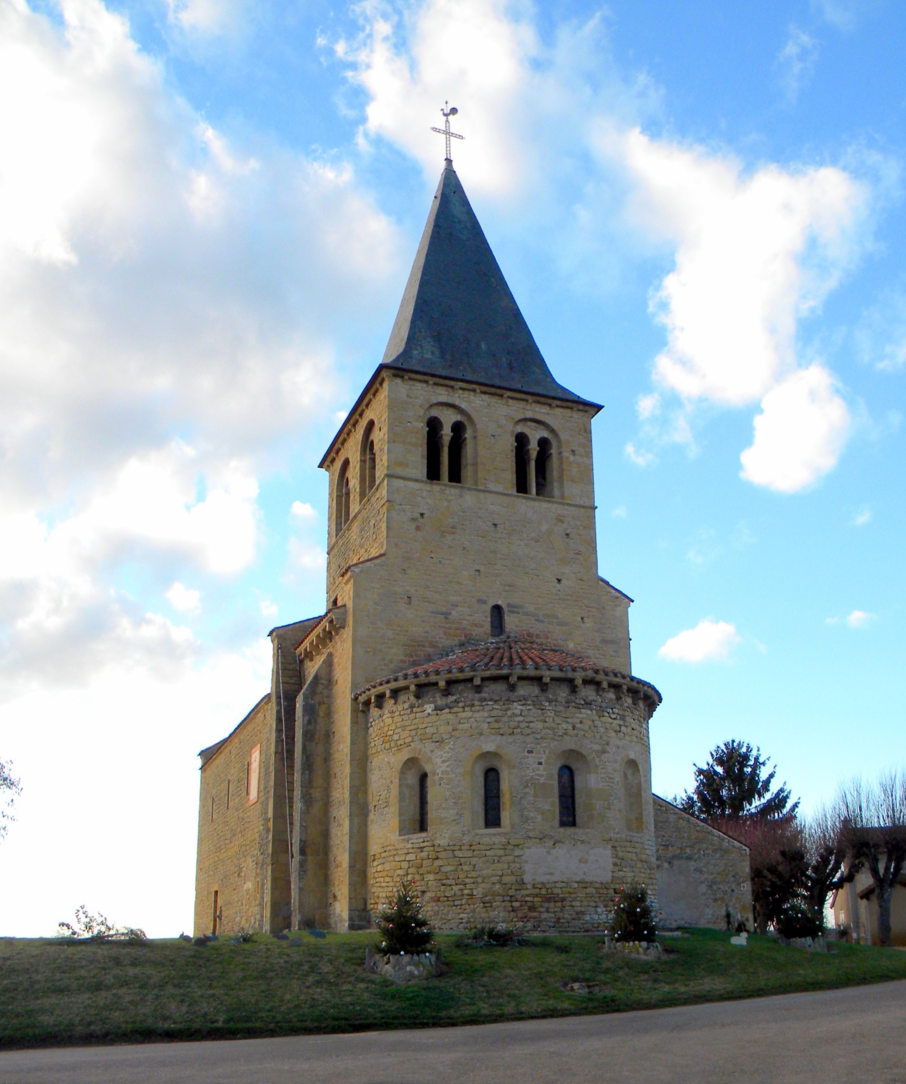 L'église romane de Baugy